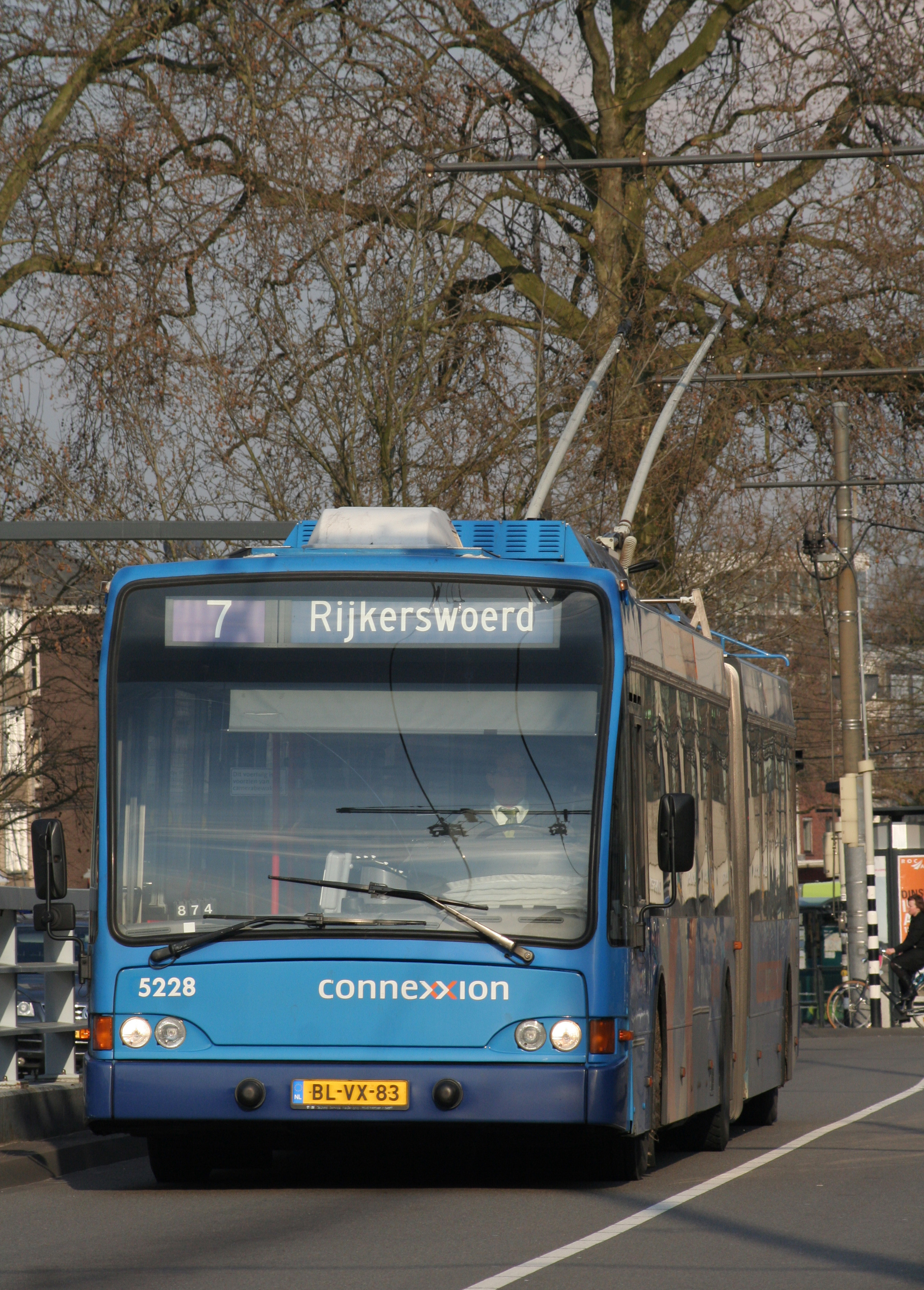 Gelede trolleybus bij eindhalte De Laar-West